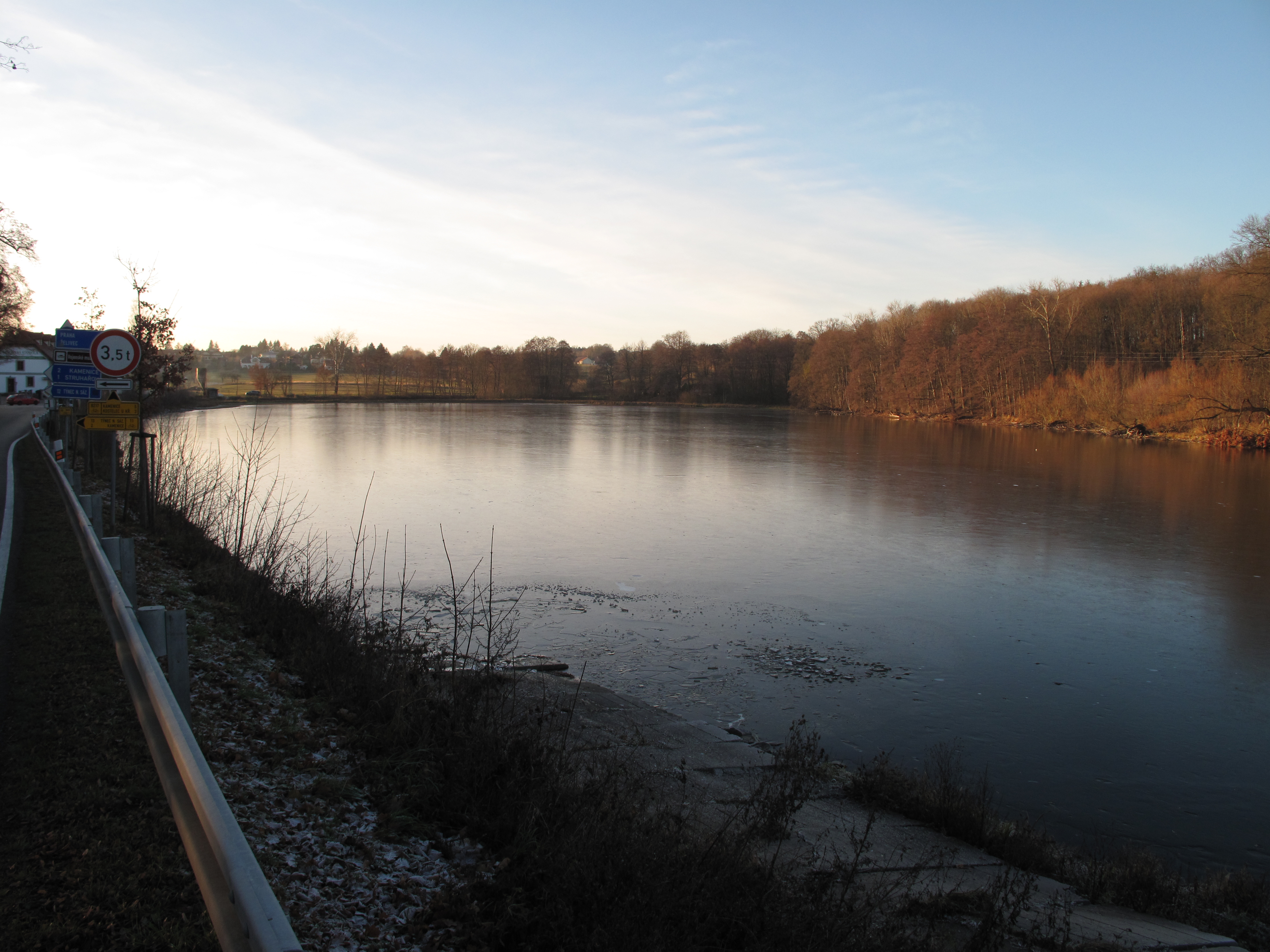 Štiřínský rybník ve Štiříně, okres Praha-východ.